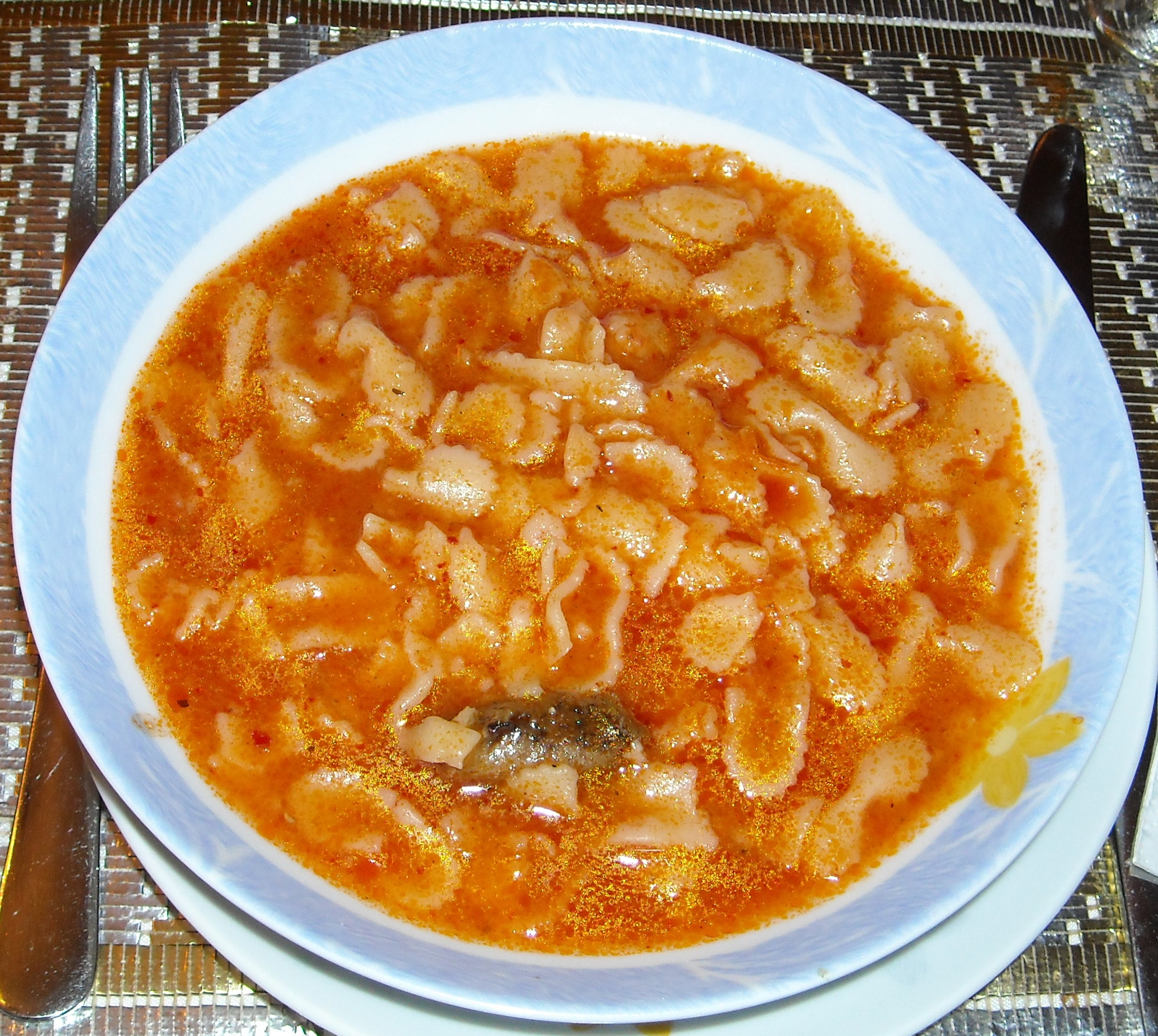 Soupe de pâtes tunisienne (makrouna jaria)